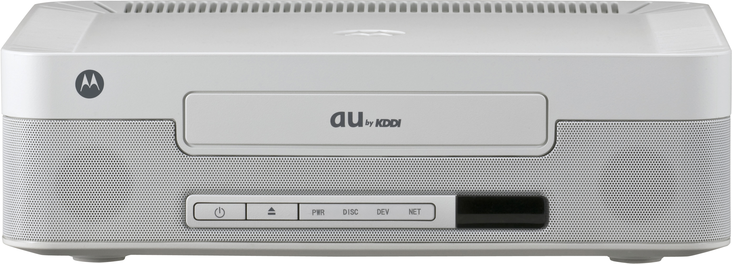 投稿者自身による作品